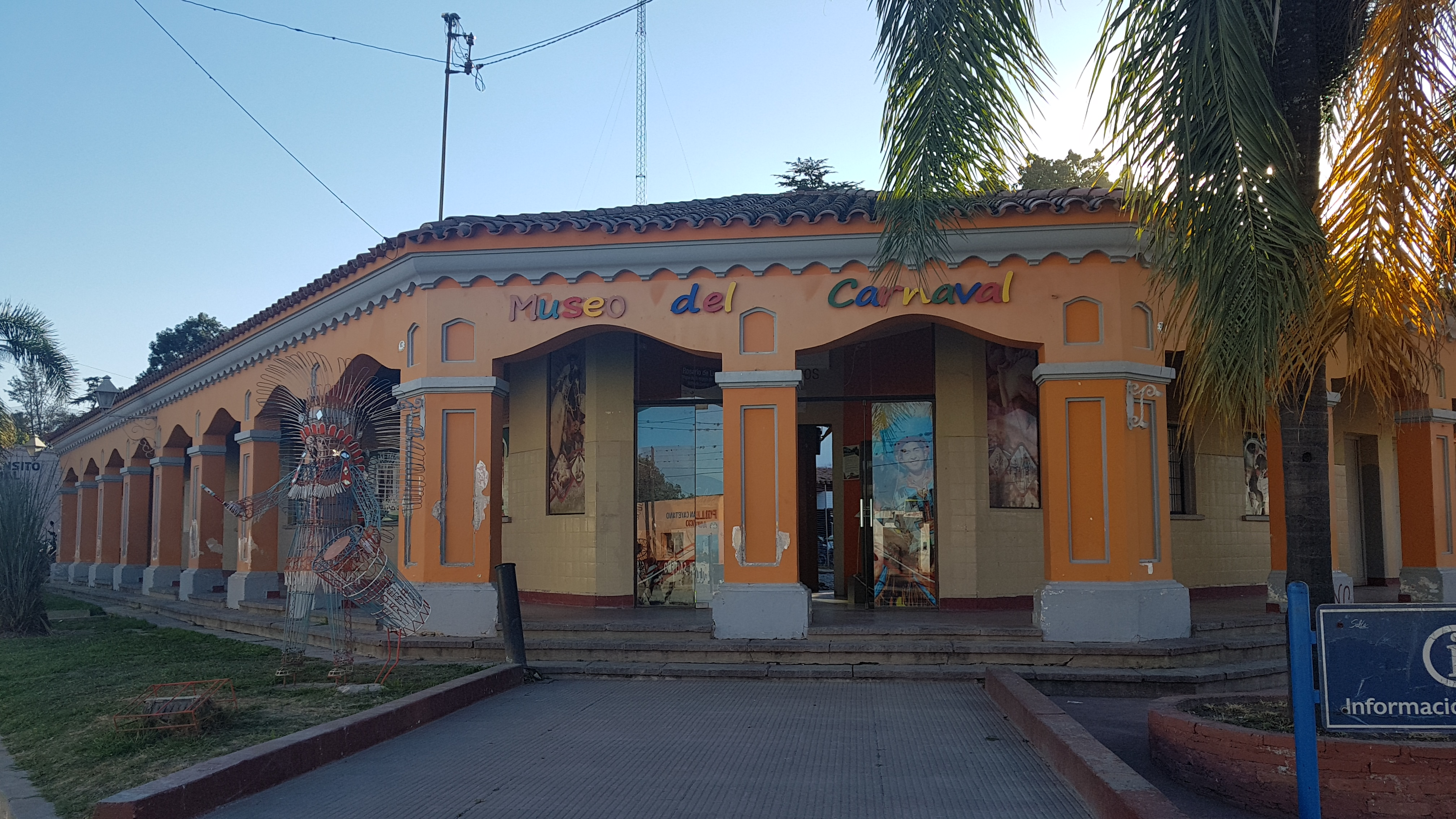 Tiene como fin difundir las historias carnestolendas y parte de restos arqueológicos de la localidad de Rosario de Lerma, en su interior exhibe los trajes de las comparsas, murgas y caporales participantes en los desfiles de dicha localidad.edificio